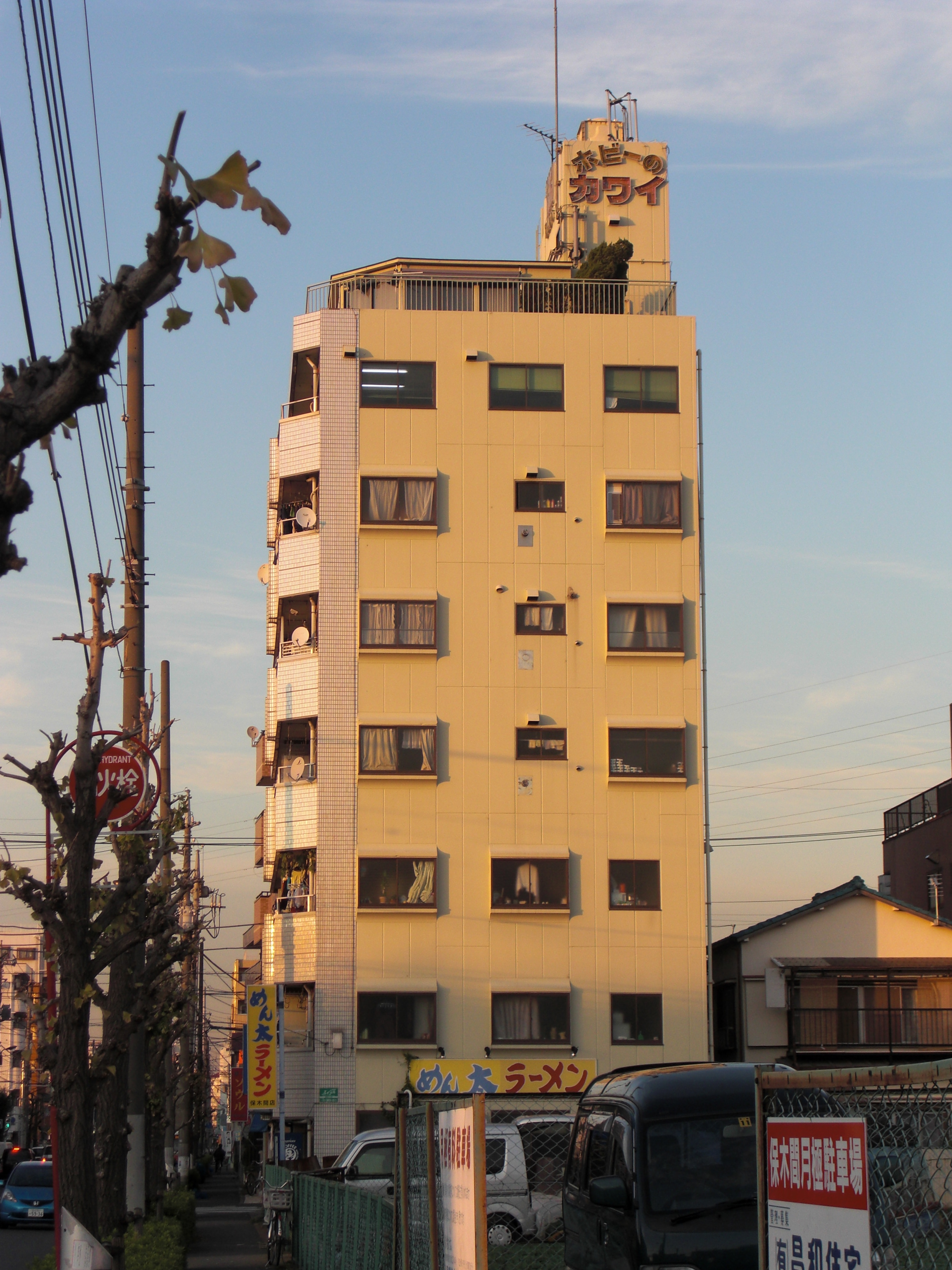 河合商会本社ビル全景